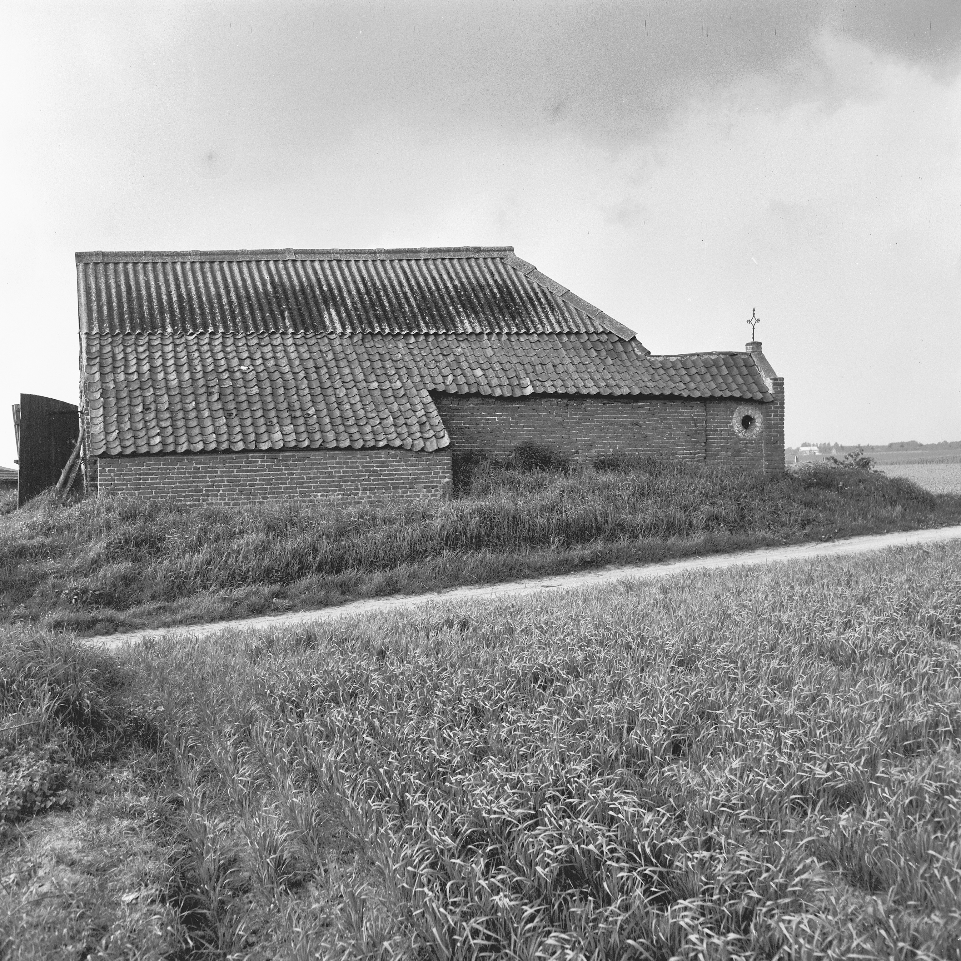 Diversen: Schuur, met St. Annakapel